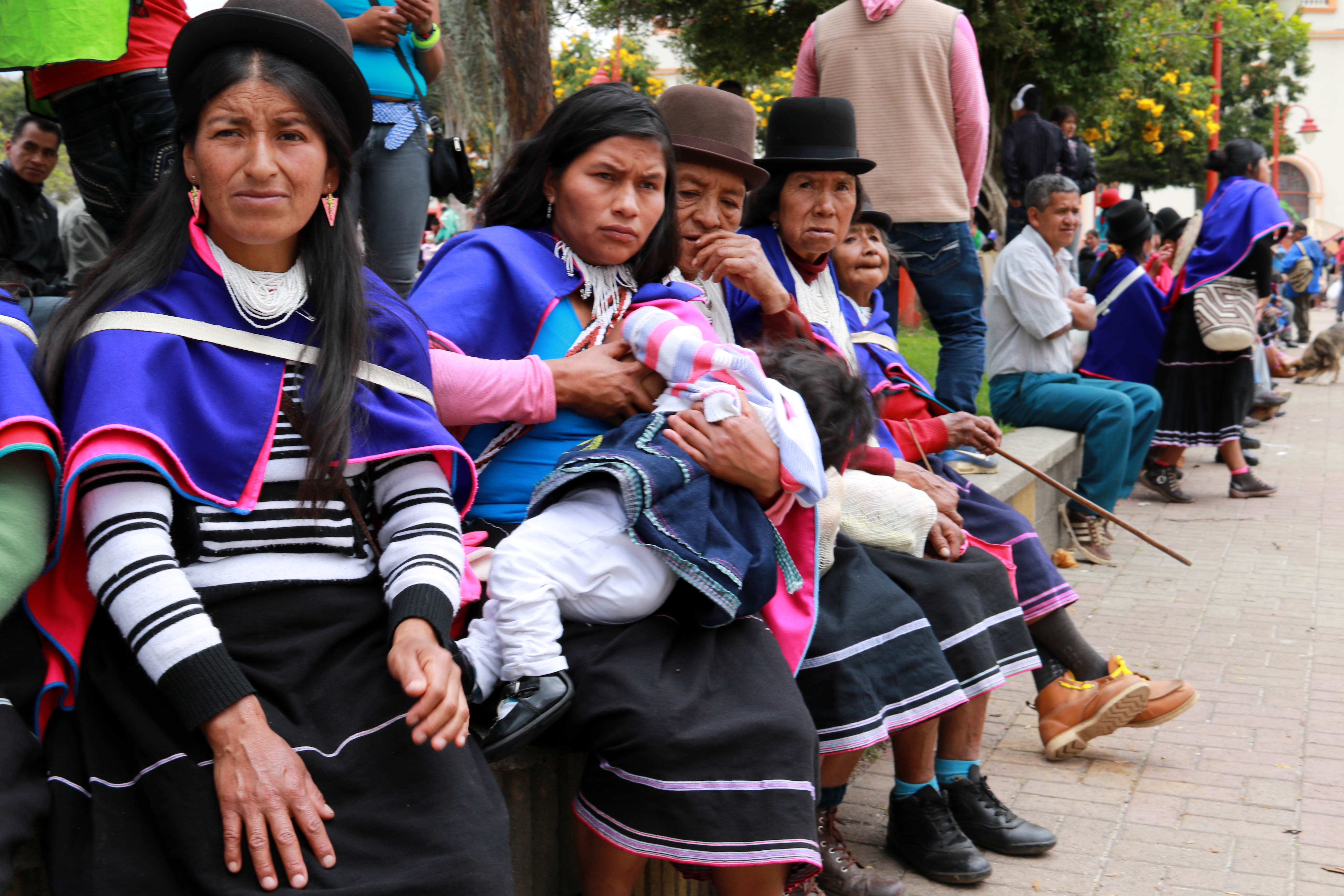 Colombie, Indiens Guambianos à Silvia